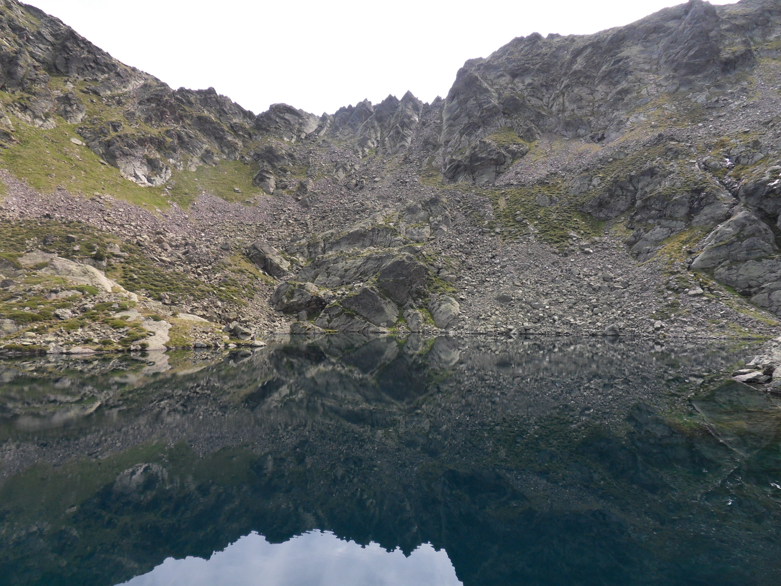 Quatrième étang du Picot 2416m